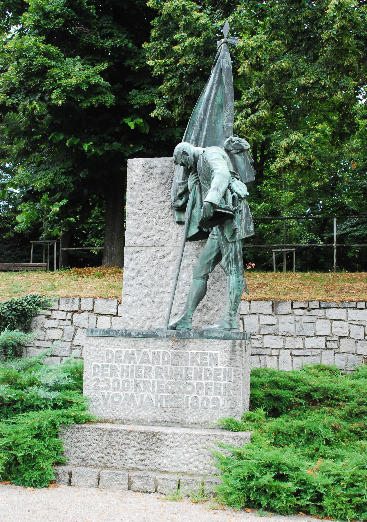 Das Kriegerdenkmal 1809 zur Erinnerung an rund 2300 hier bestattete Soldaten